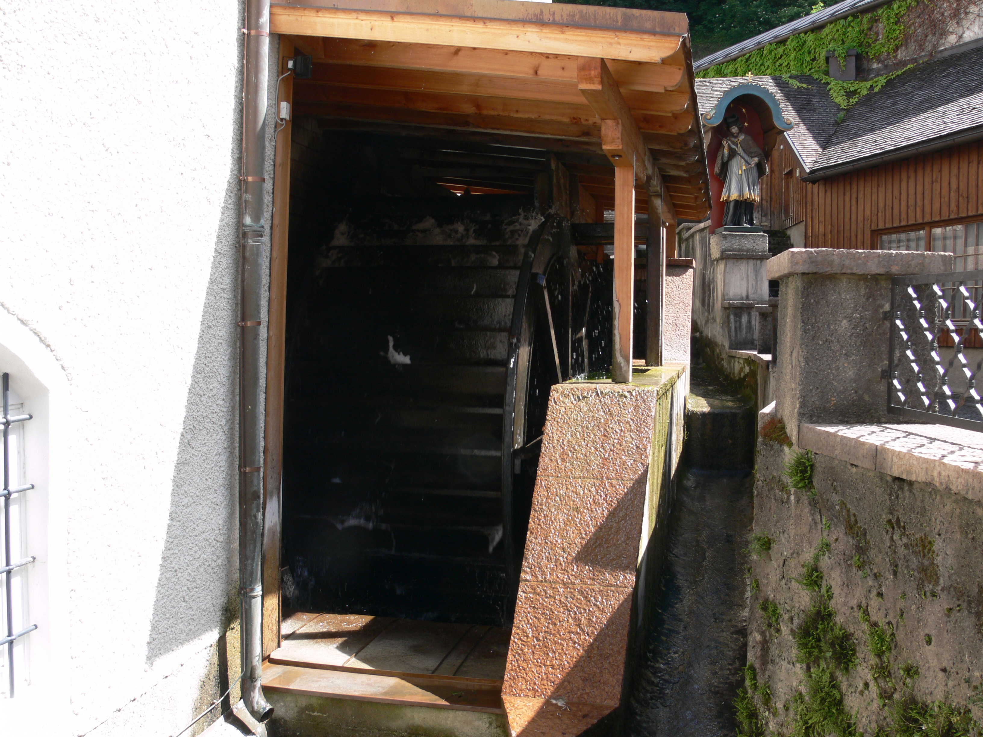 Salzburg, Stiftsmühle/Stiftsbäckerei des Stifts St. Peter